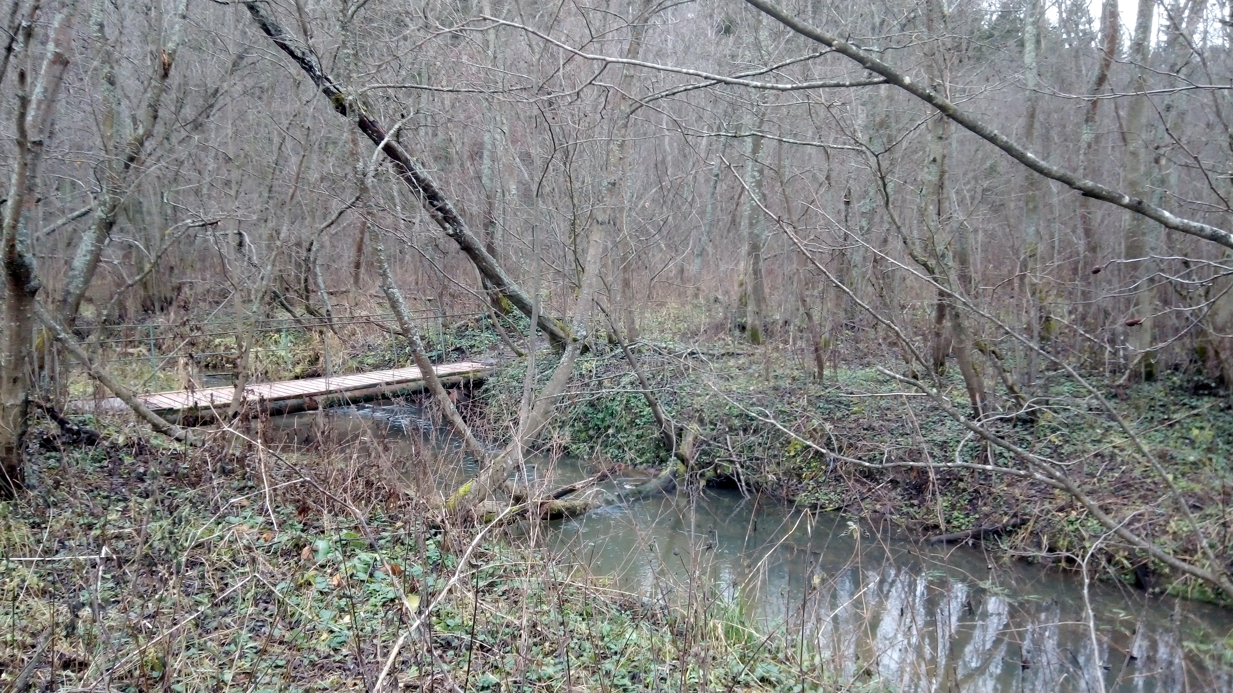 Кимерша у деревни Киндяково.Октябрь 2019.